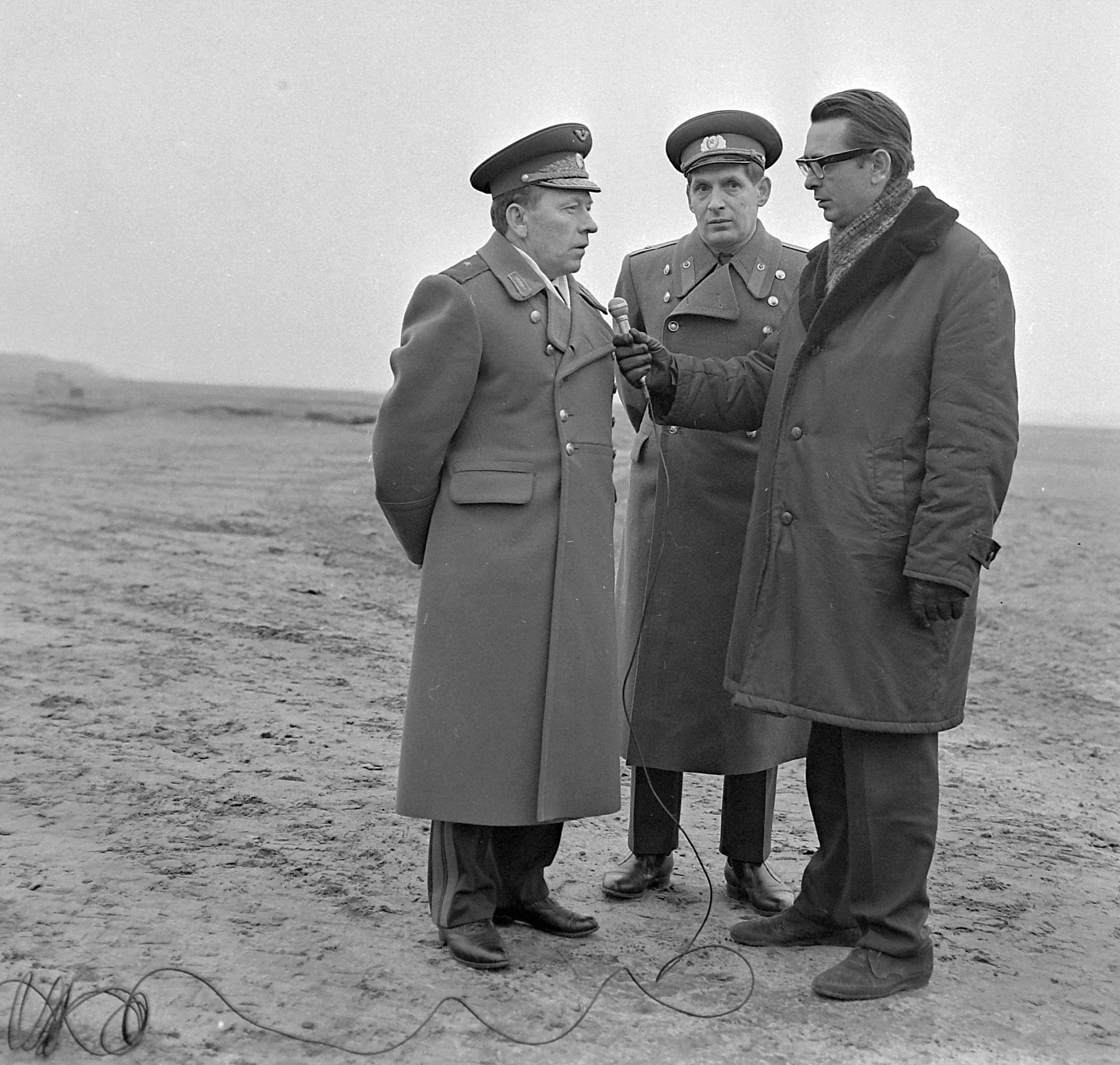 Tags: reporter, soldier